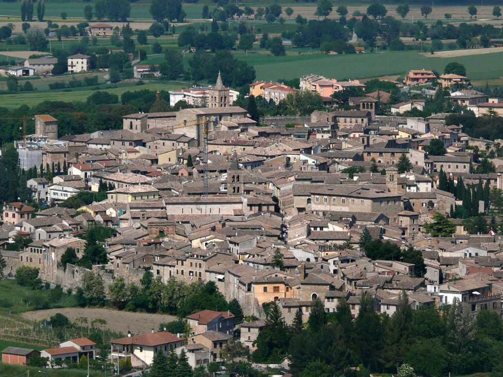 Bevagna, view